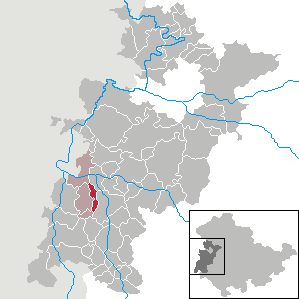 Martinroda in Thuringia - Wartburgkreis